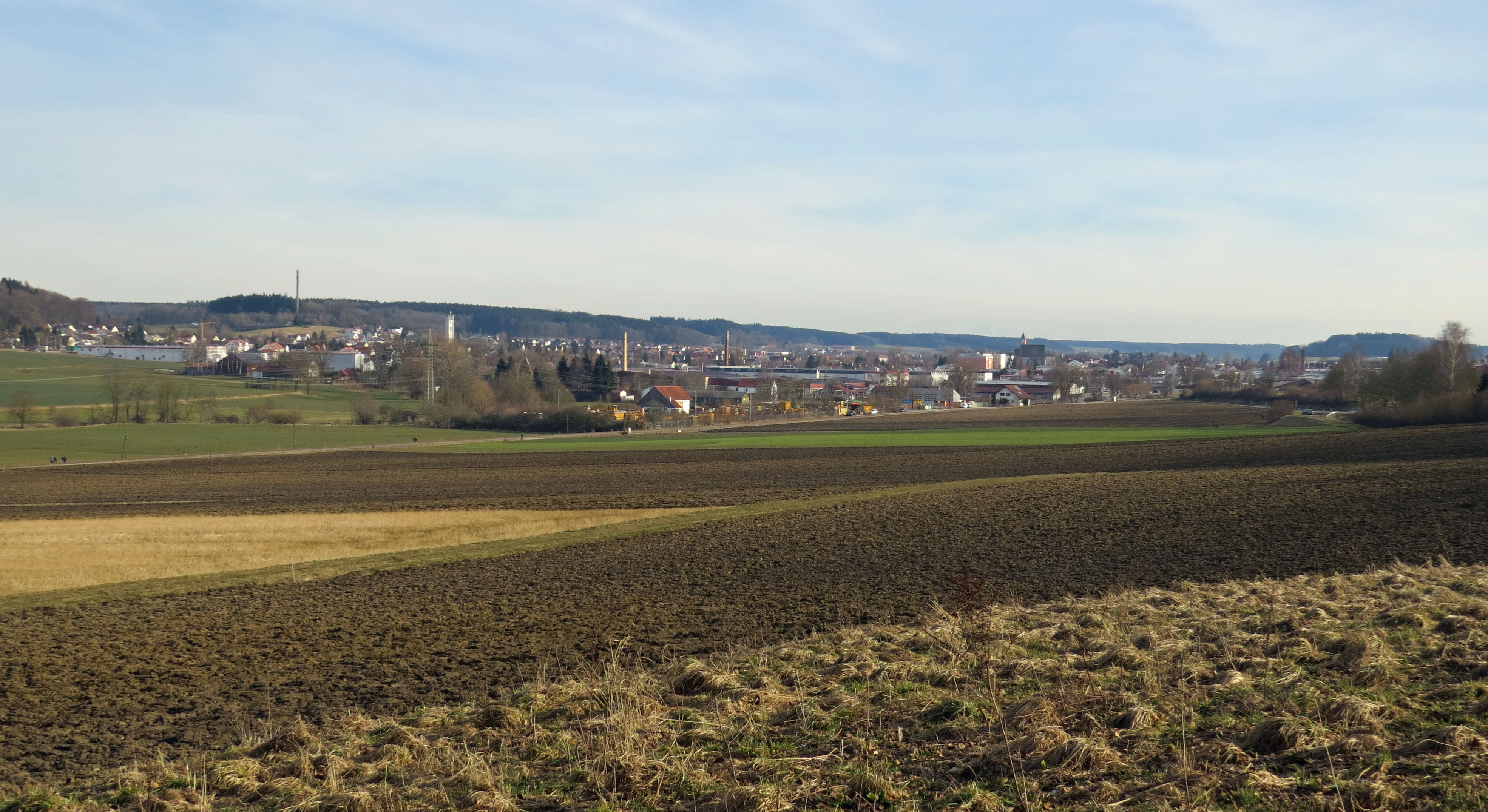 Krumbach (Schwaben) von Norden